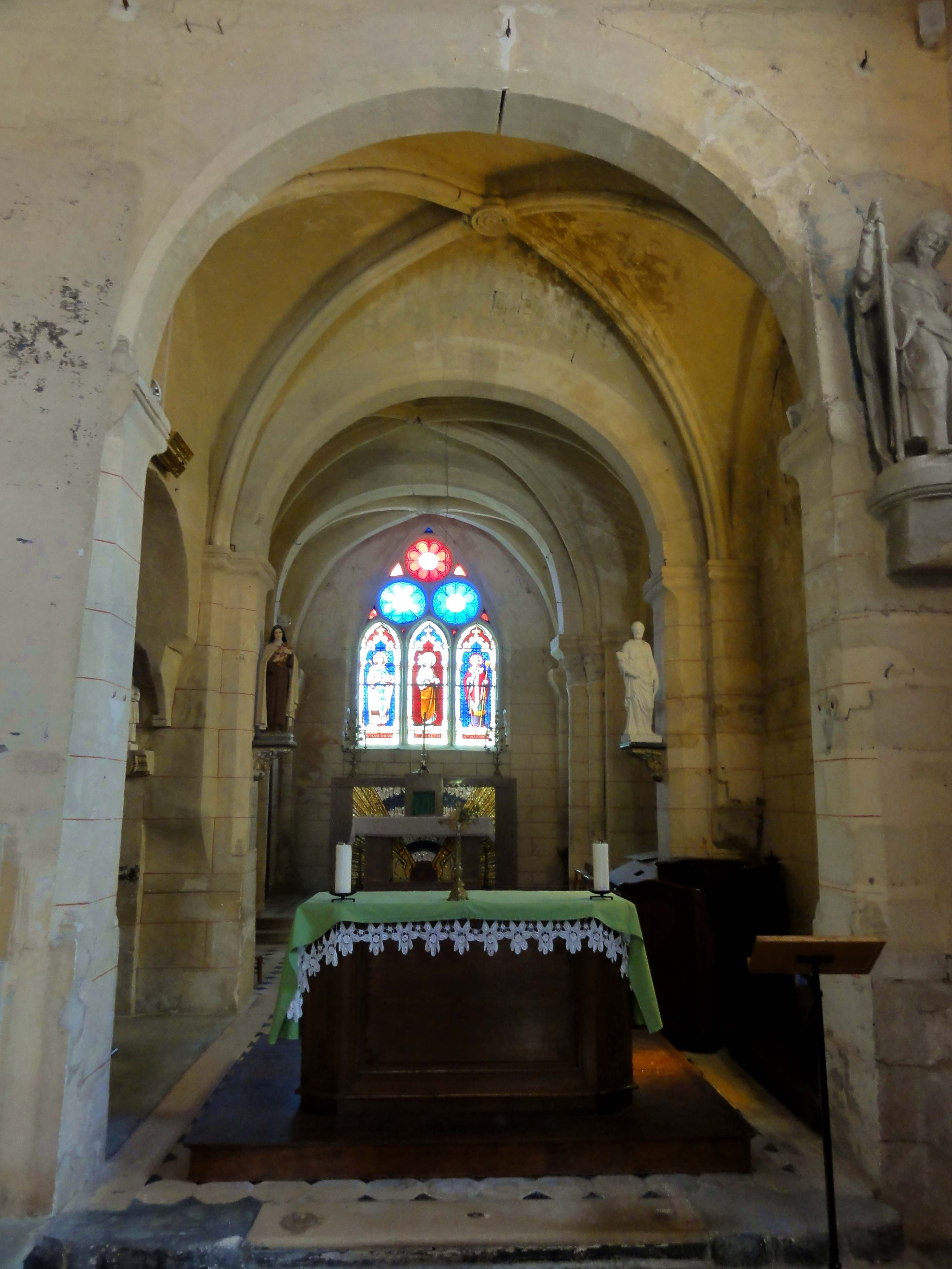 Intérieur de l'église Saint-Martin de Labbeville (voir titre).